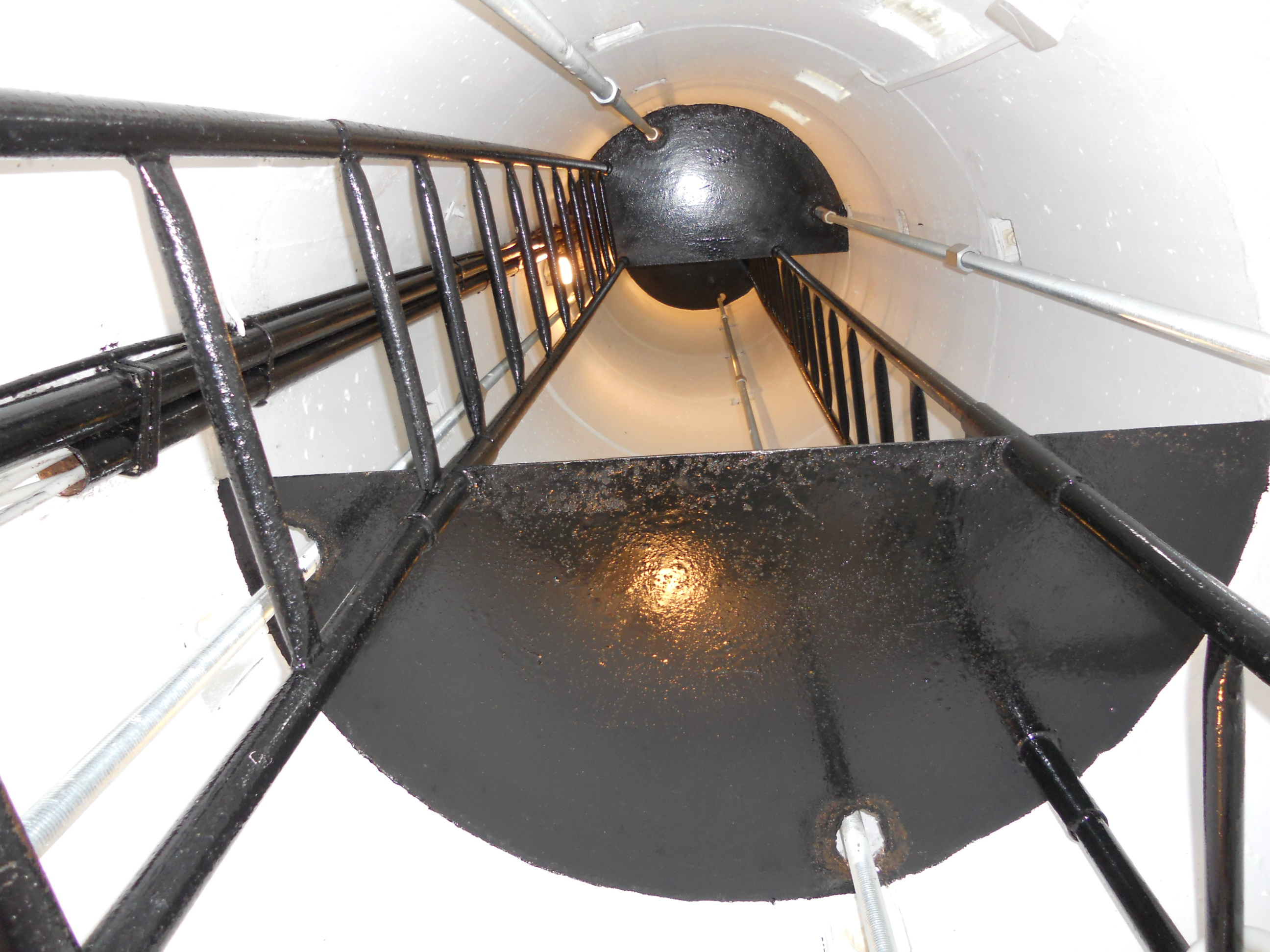 Innenansicht des Grenzwachturms Kühlungsborn